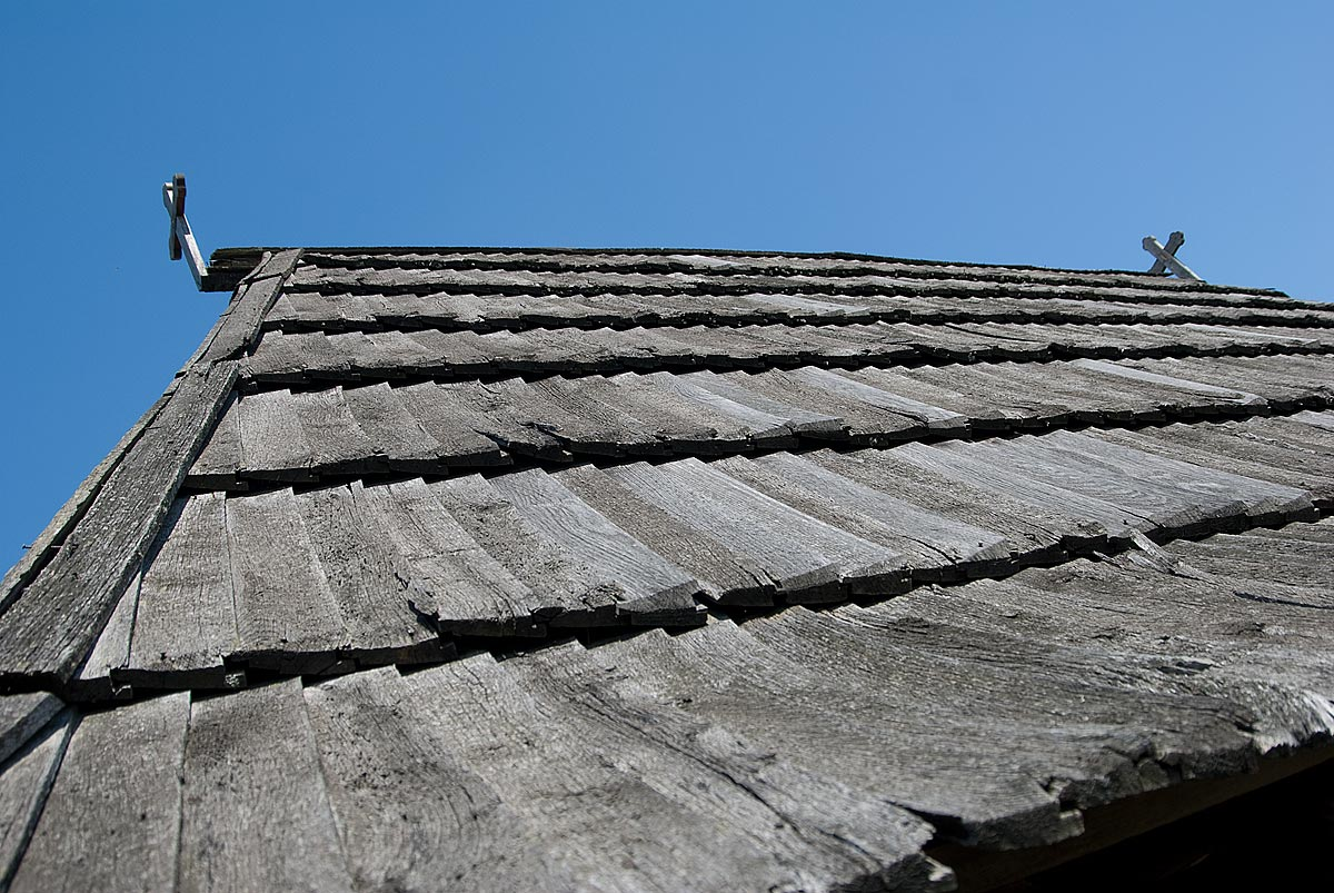 Кров од шиндре, црква у Прањанима.